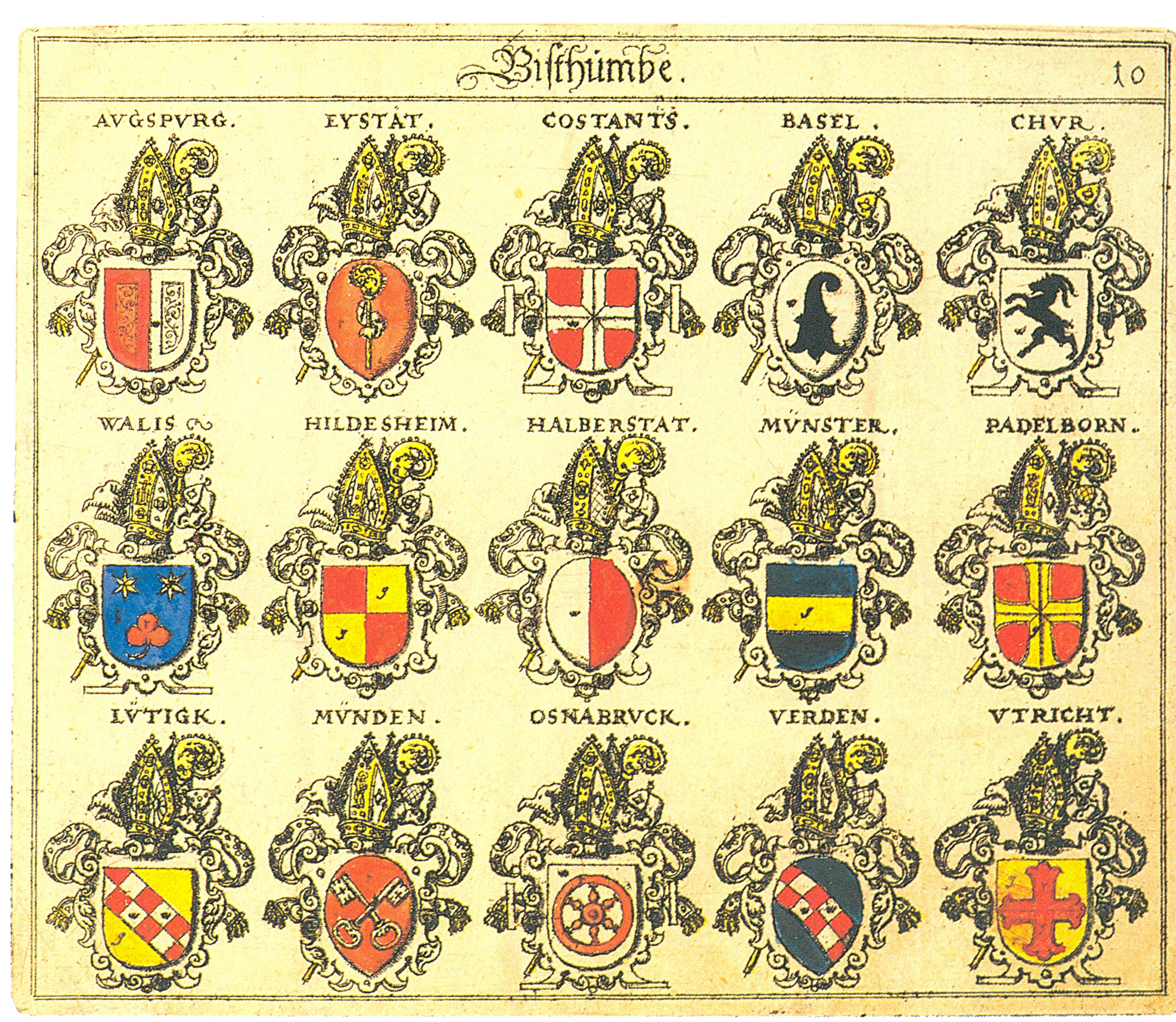 Johann Siebmacher: New Wappenbuch eingescannt aus: Horst Appuhn (Hrsg.), Johann Siebmachers Wappenbuch. Die bibliophilen Taschenbücher 538, 2. verb. Aufl , Dortmund 1989 Bistümer Blatt 10